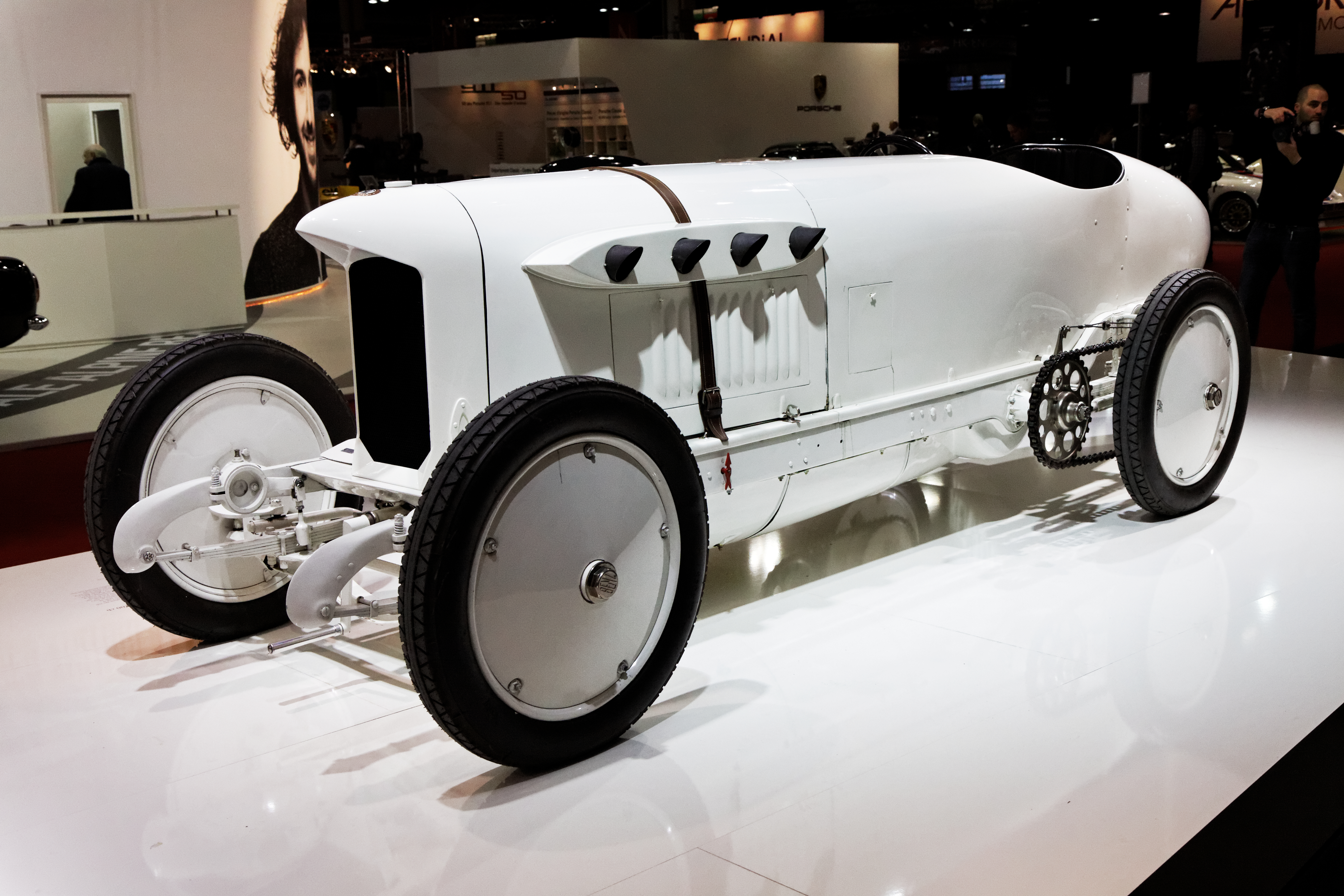 Une Blitzen Benz de 1909 présentée lors du salon retromobile 2013.